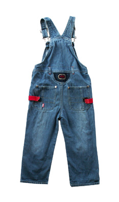 Een klassieke tuinbroek in jeans.